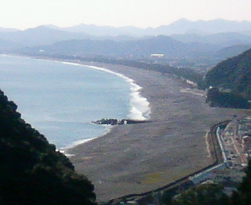 Vue de la plage de Shichirimihama (Japon)